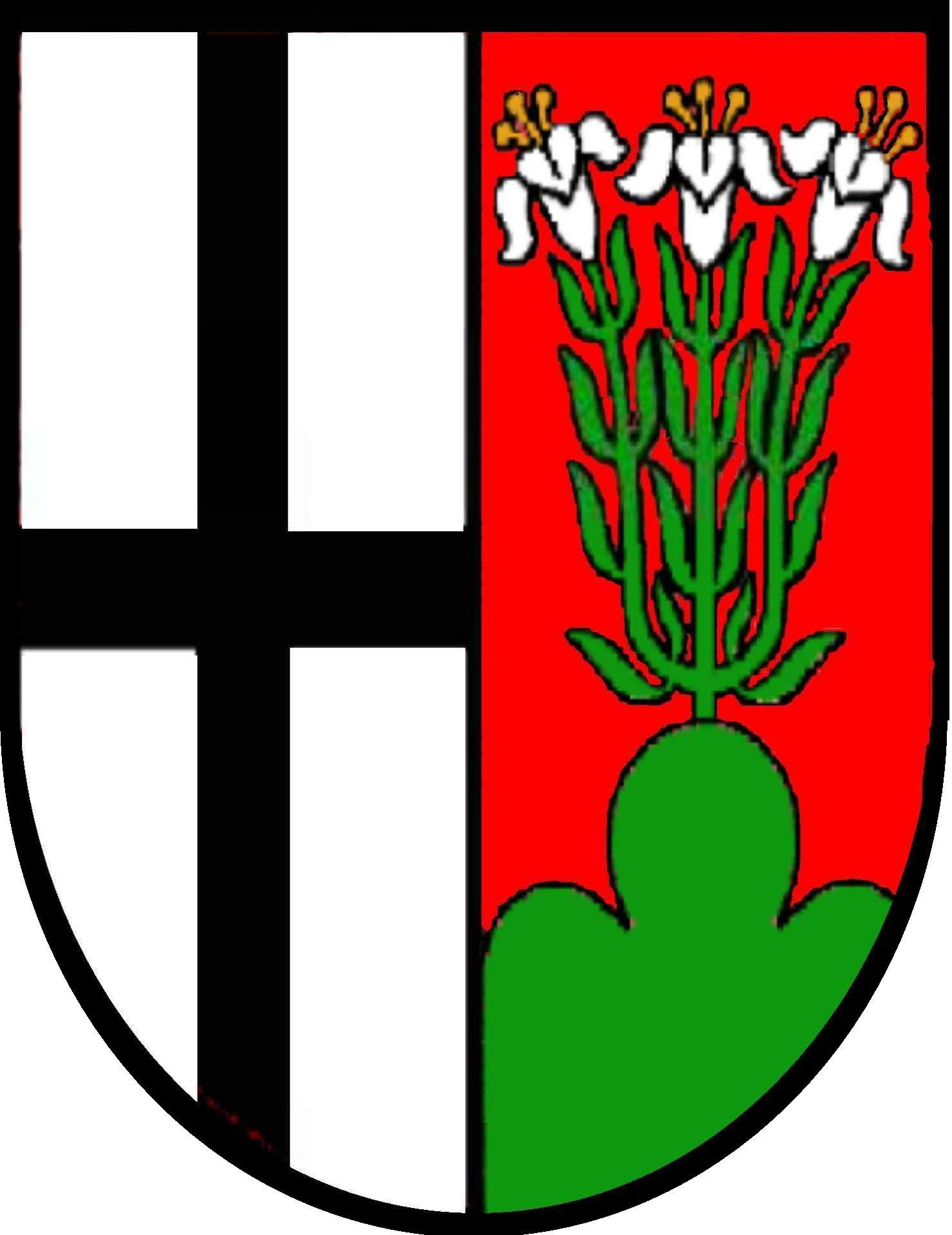 Bischofswappen Fulda 1828 bis 1894 (teils gespalten, teils geviert)